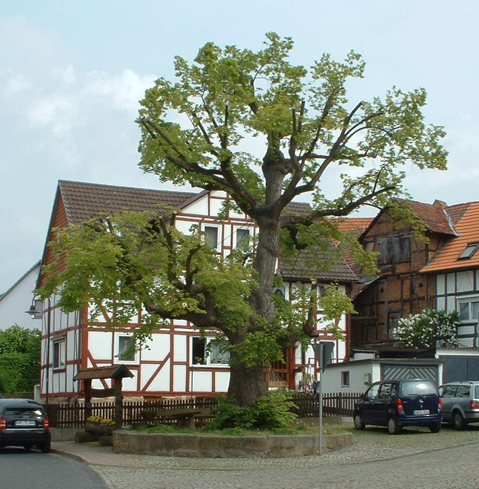 Geleitete Linde in Melsungen - Schwarzenberg